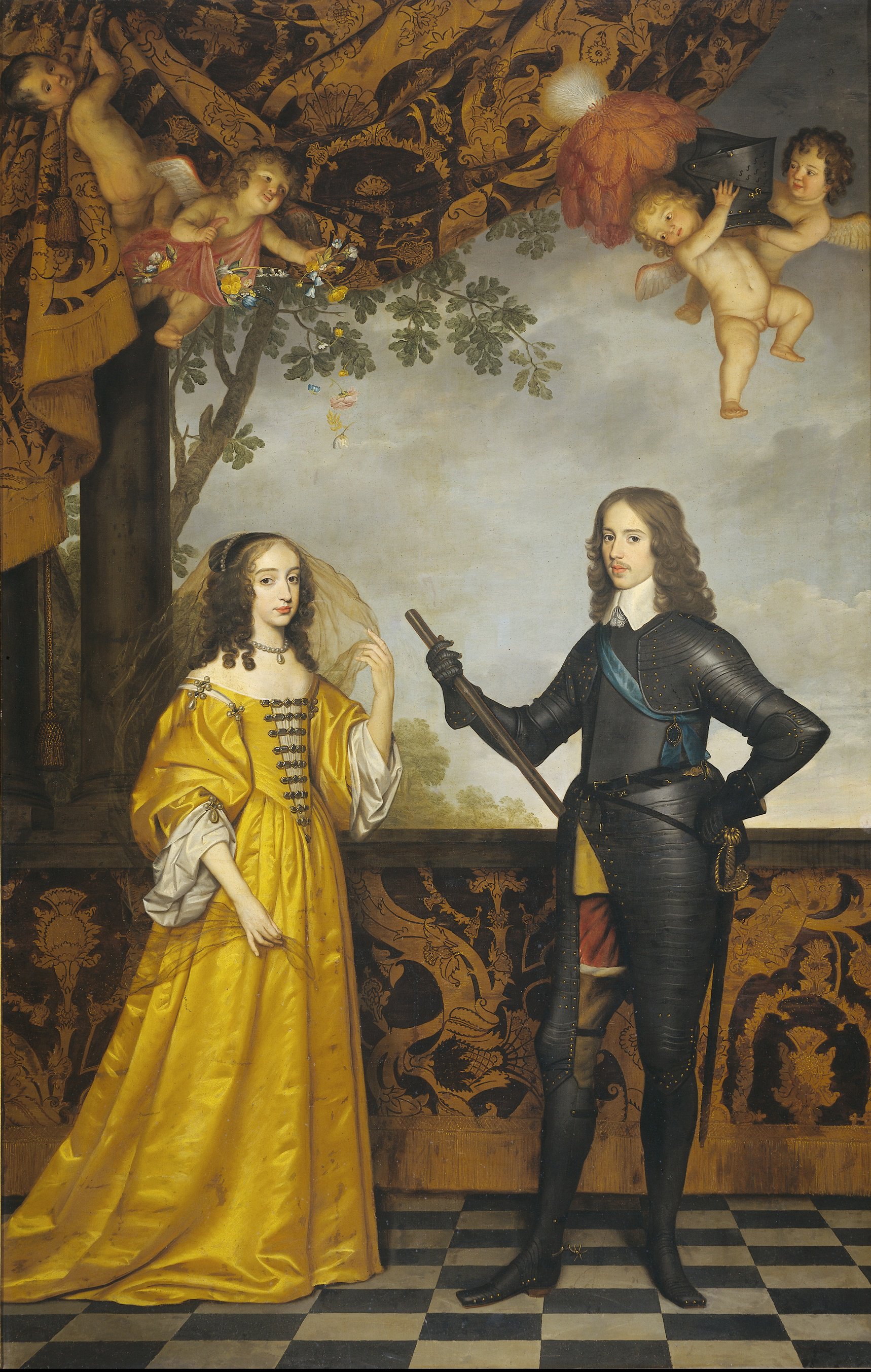 Portret van Willem II, prins van Oranje, met zijn echtgenote Maria Stuart. Beiden zijn ten voeten uit voorgesteld, staande op een balkon. De prins in wapenrusting met commandostaf in de rechterhand. In het gordijn linksboven spelen vier putti, twee met de helm van de prins, één strooit met bloemen. Behoort bij de portretten: SK-A-874 en SK-A-873.